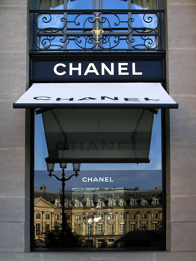 Boutique Chanel Joaillerie, 18, place Vendôme, Paris